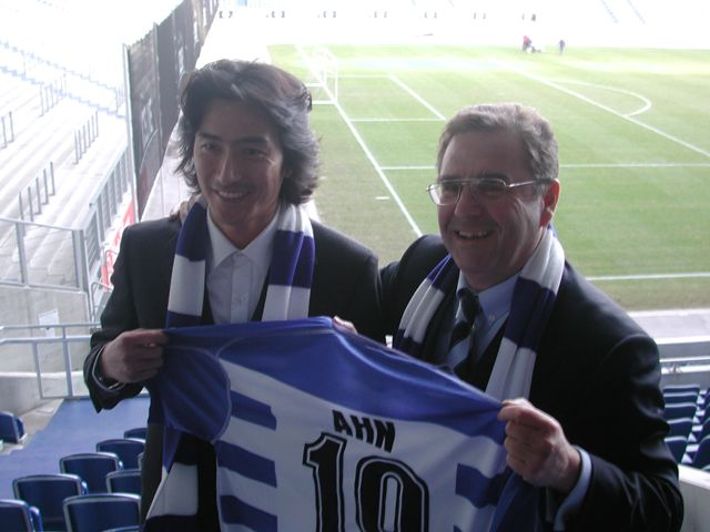 Ahn Jung-hwan bei seiner Präsentation als Neuverpflichtung für den MSV Duisburg am 24.01.2006 (rechts im Bild MSV-Duisburg-Präsident Walter Hellmich).